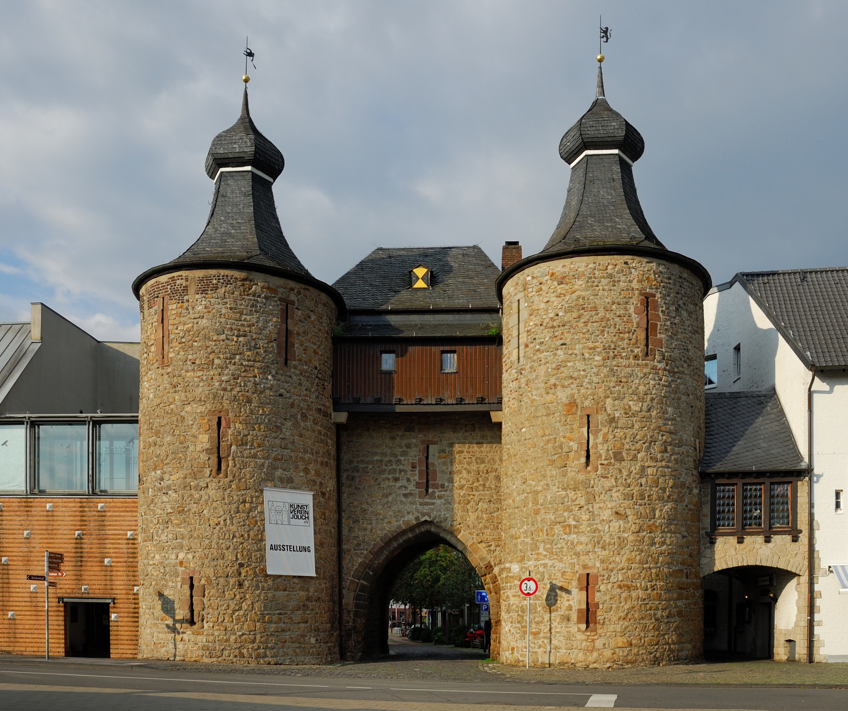 Hexenturm, Jülich, Kleine RuhrstraßeThis is a photograph of an architectural monument., no. 13